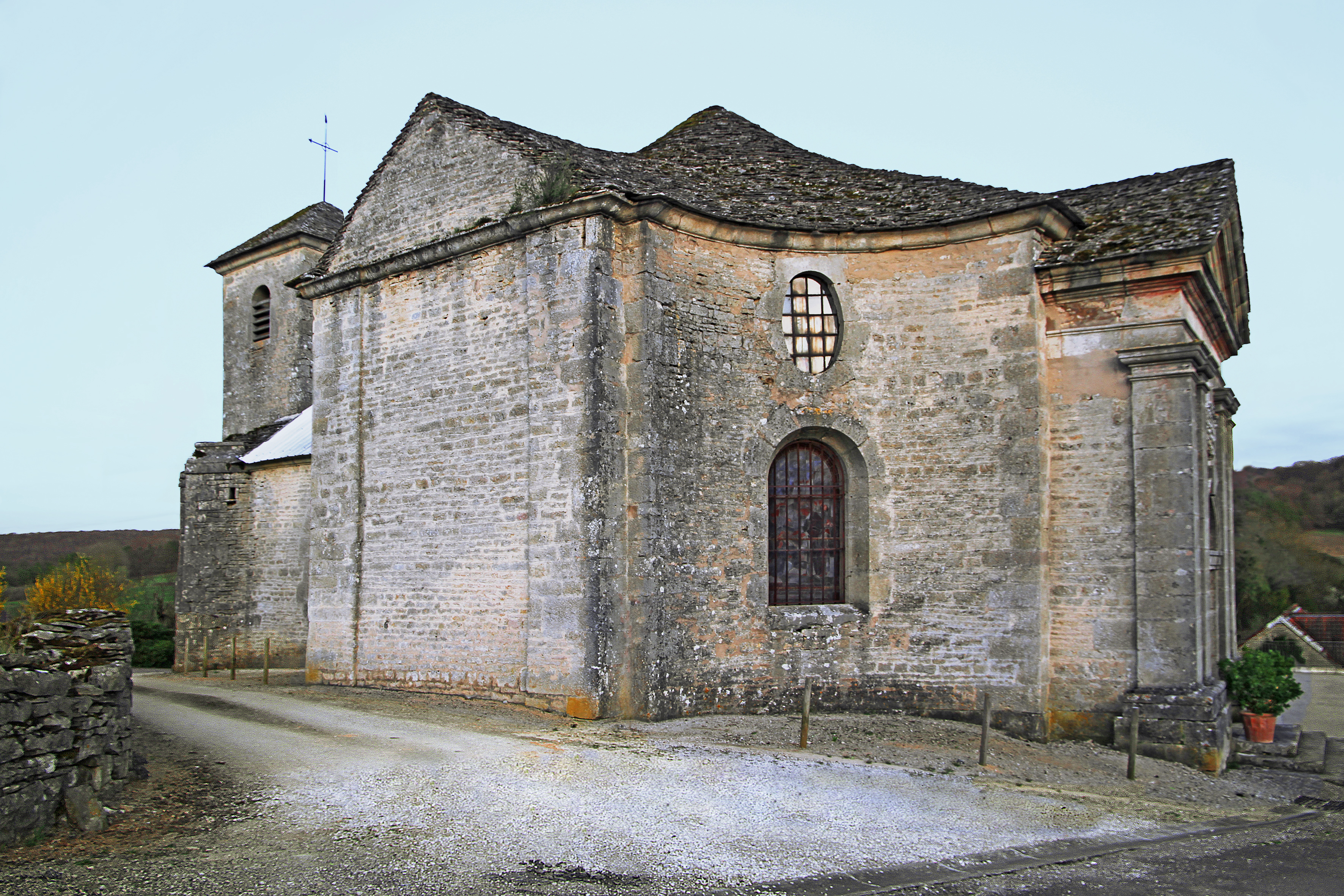 Église Saint-Barthelémy de Poncey-sur-l'Ignon